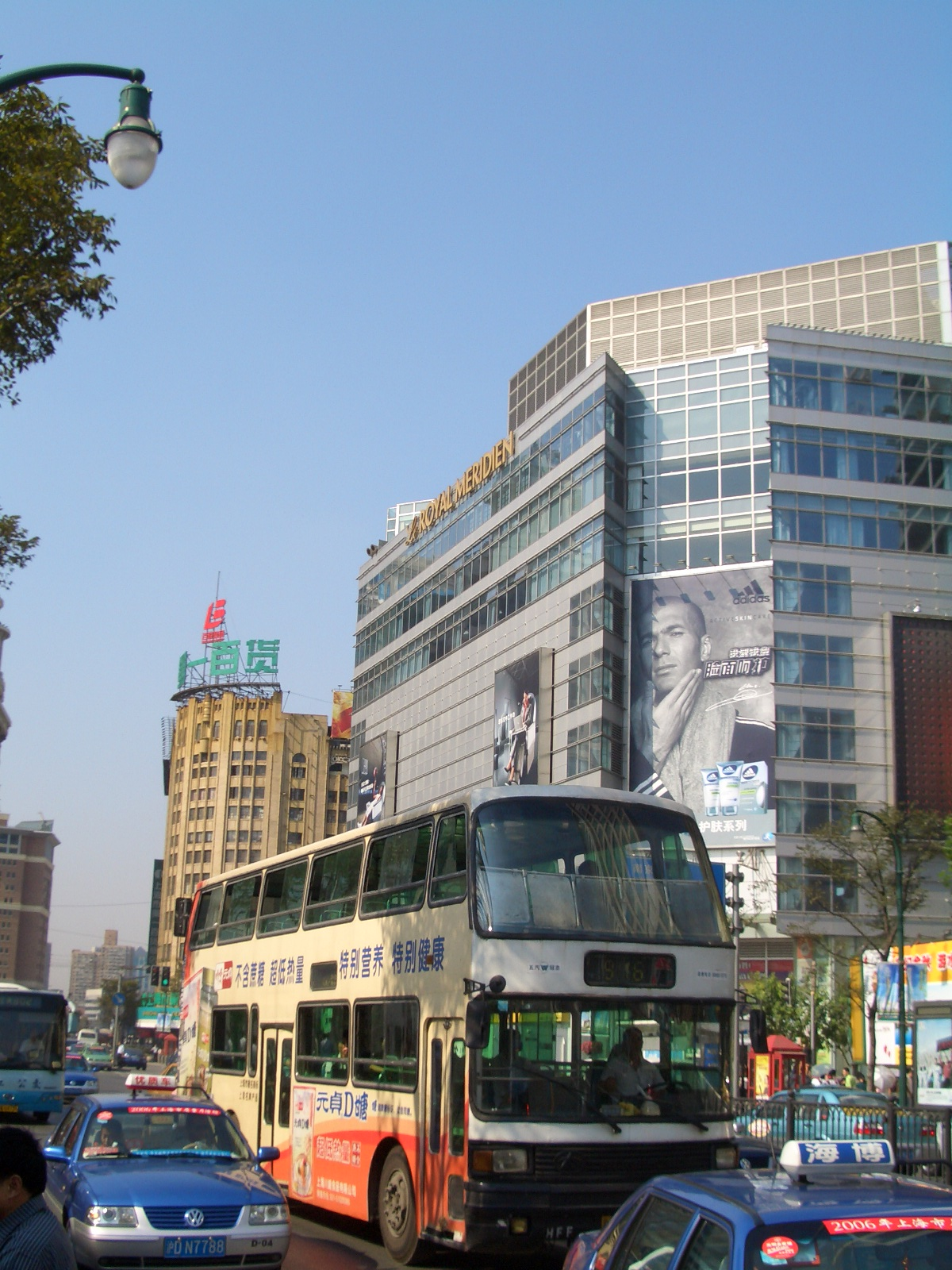 上海第一百貨以及門前的雙層巴士